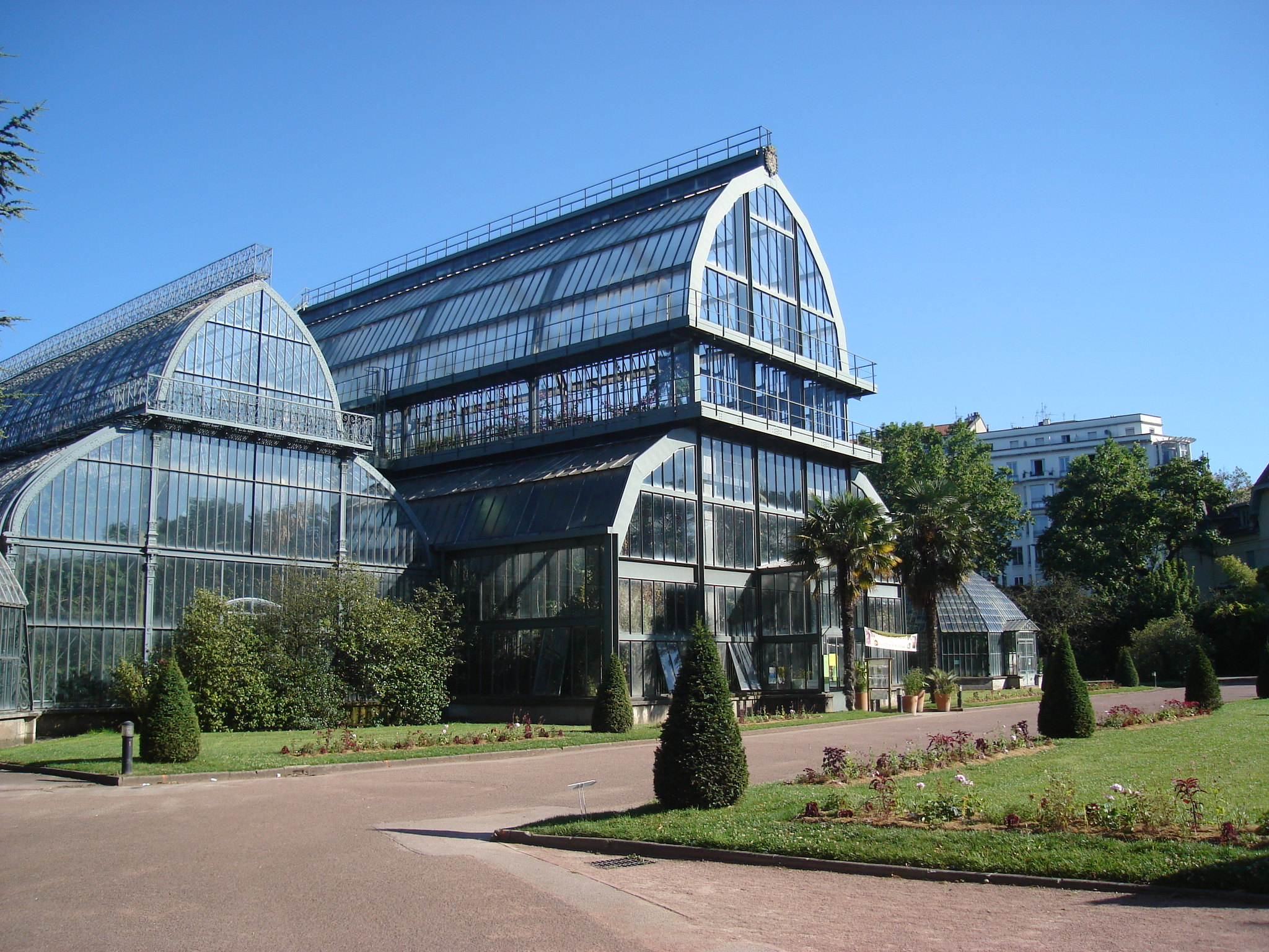 Grandes serres du Parc de la Tête d'Or, Lyon